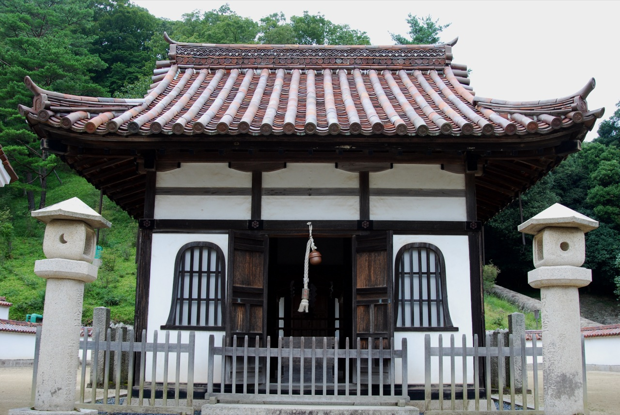 Shizutani school , Shizutani, Bizen, Okayama, Japan 1670-1701 閑谷学校、岡山県備前市閑谷 Mitsumasa Ikeda, Nagatada Tsuda 池田光政、津田永忠 旧閑谷学校講堂1701（国宝） 旧閑谷学校小斎、習芸斎・飲室、文庫、公門、石塀、聖廟、閑谷神社など（重要文化財） 椿山（御納所）1702 Nikon D40x